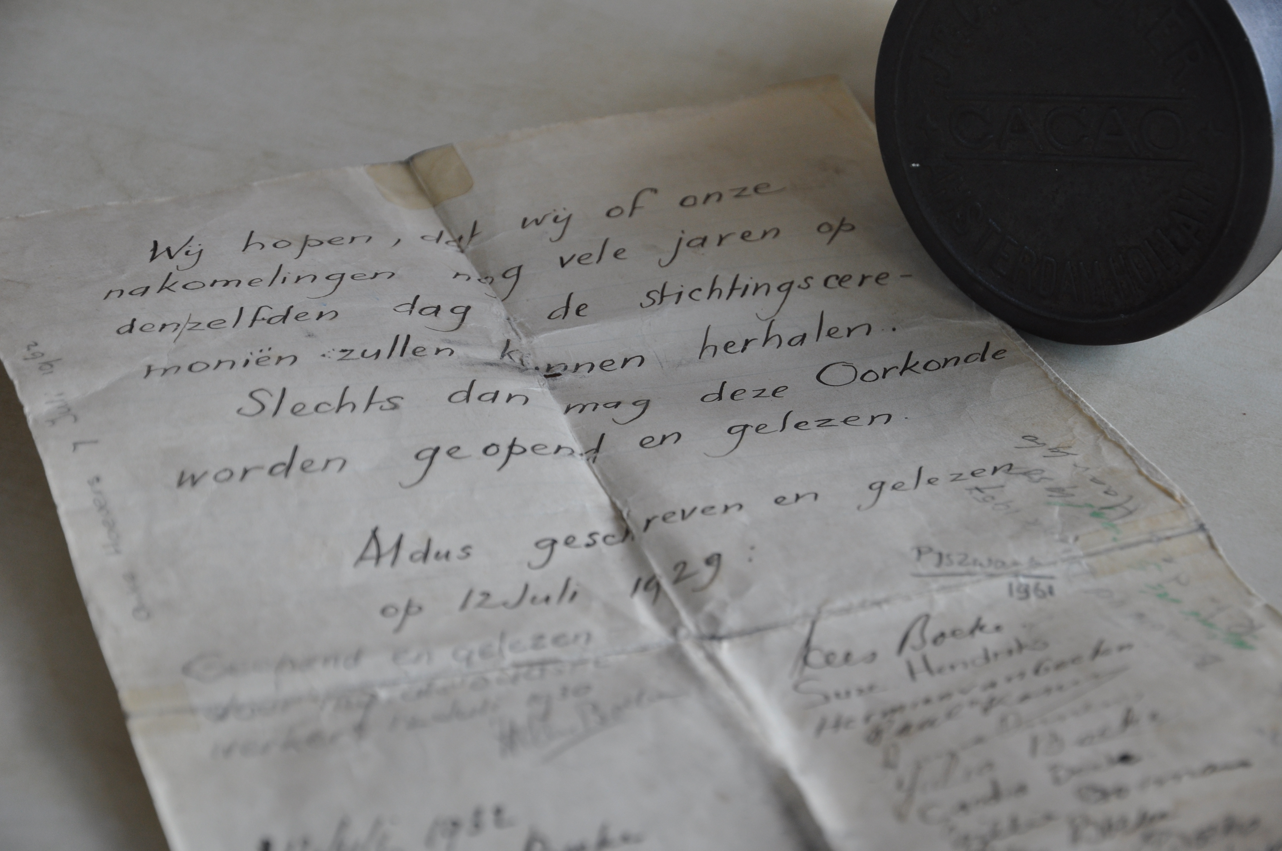 De oprichtingsbrief van de Werkplaats Kindergemeenschap uit 1926. Deze is ondertekend door o.a. Kees Boeke zelf.